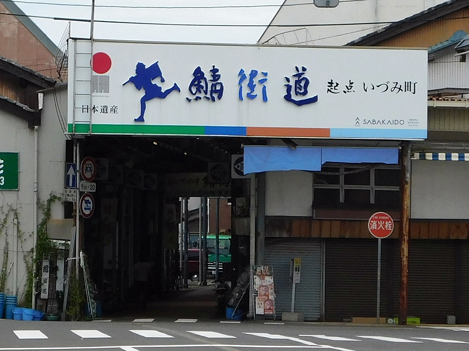 福井県小浜市の鯖街道起点があるいづみ町アーケード入口、近くに小浜市まちの駅と旭座がある。